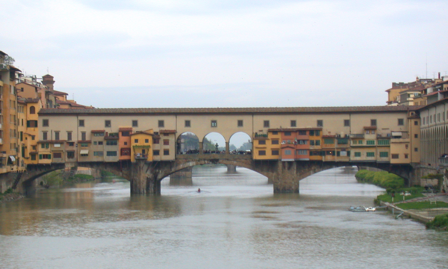 Firenze, Ponte Vecchio, lato est (sinistro) del ponte con il Corridoio Vasariano.